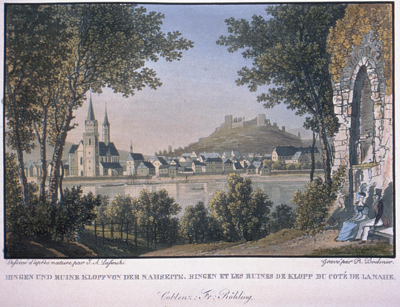 Altkolorierter Aquatintastich von R.Bodmer nach Vorlage von J.A. Lasinsky